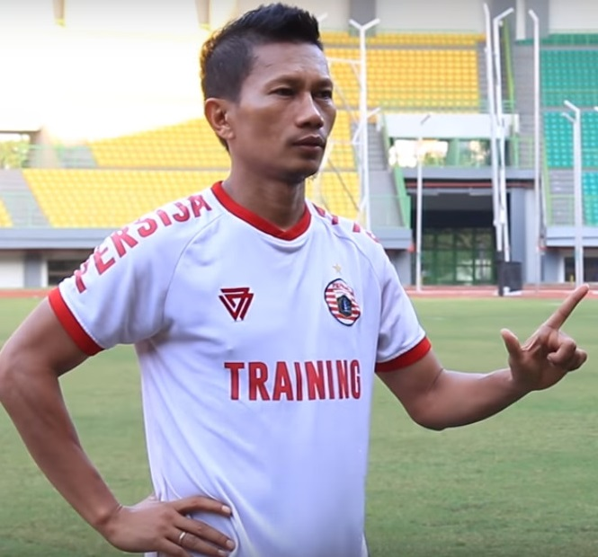 Ismed Sofyan berpose dalam sesi pemotretan pemain Persija Jakarta, 2017